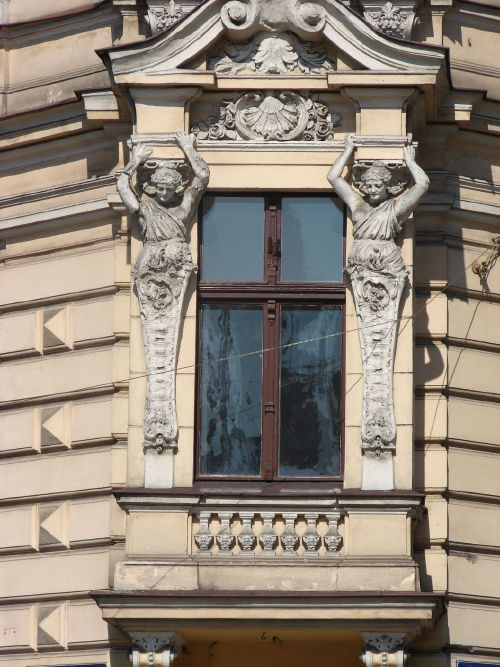 Detale na kamienicy Gdańska 63 w Bydgoszczy